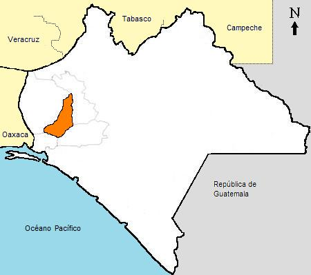 De color naranja el municipio de Jiquipilas.